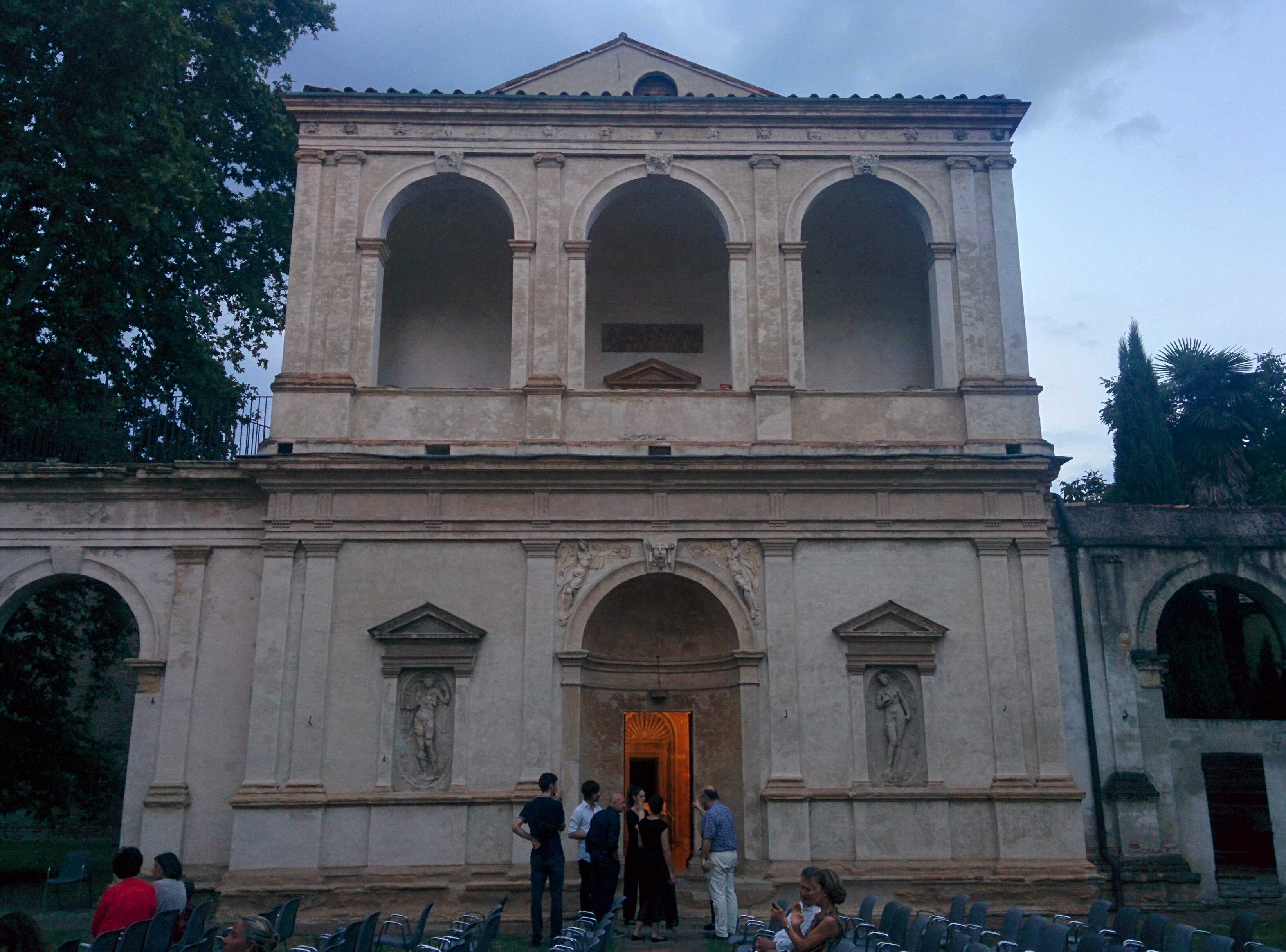 Odeo Cornaro This is a photo of a monument which is part of cultural heritage of Italy.